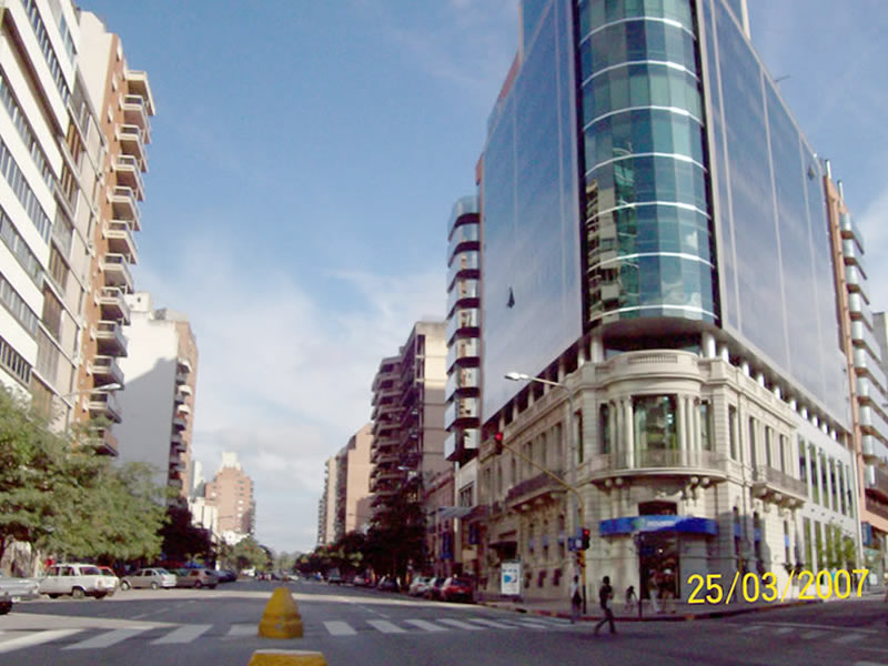 Yrigoyen Avenue, Córdoba, Argentina.